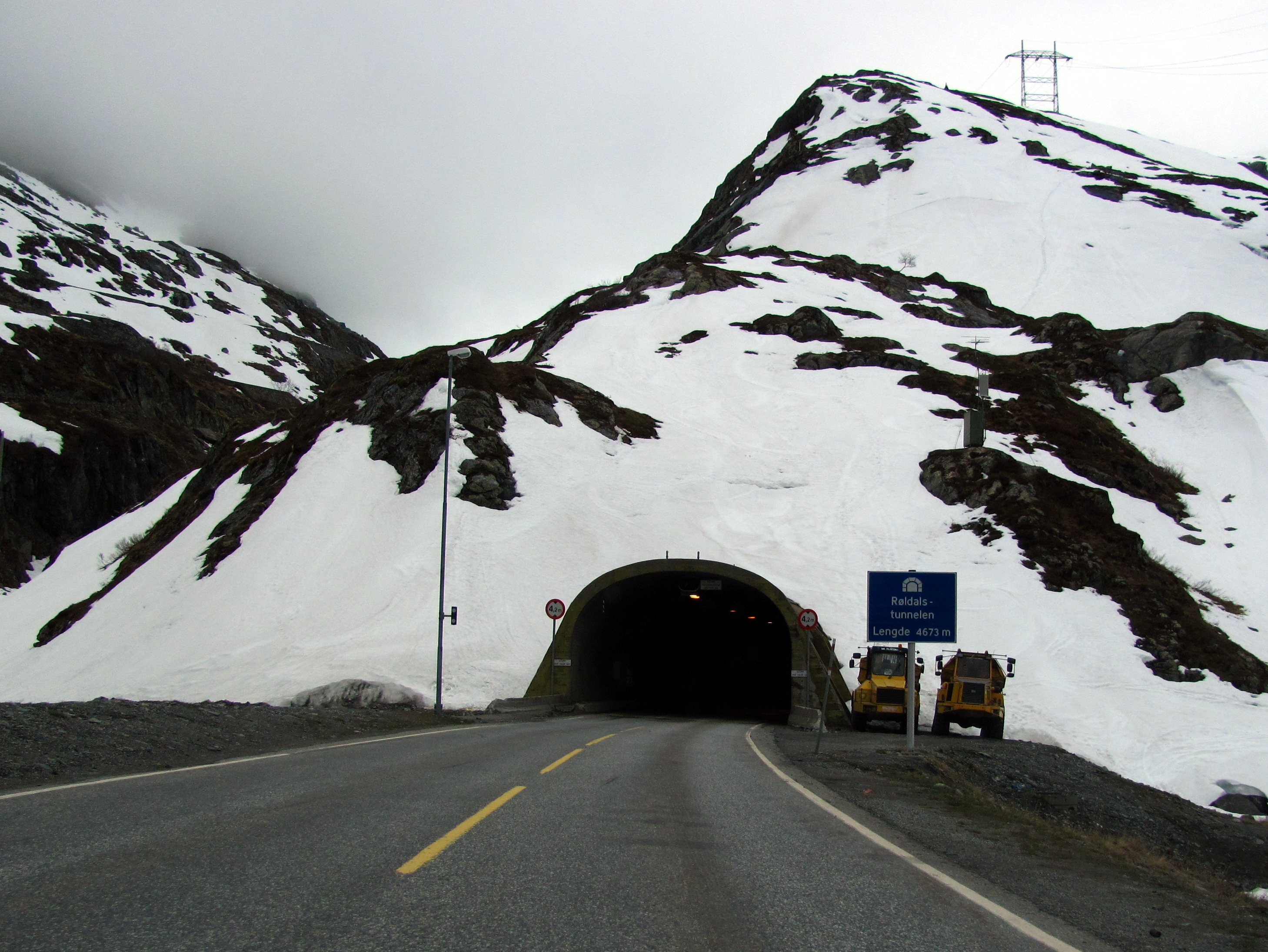 Røldalstunnelen på europavei 134 og riksvei 13 i Odda kommune i Hordaland. Tunnelen går mellom Hordadalen og Seljestadjuvet. Den er 4657 meter lang, og ble åpnet i 1964. Røldalstunnelen var Norges lengste veitunnel til Haukelitunnelen åpnet i 1968.